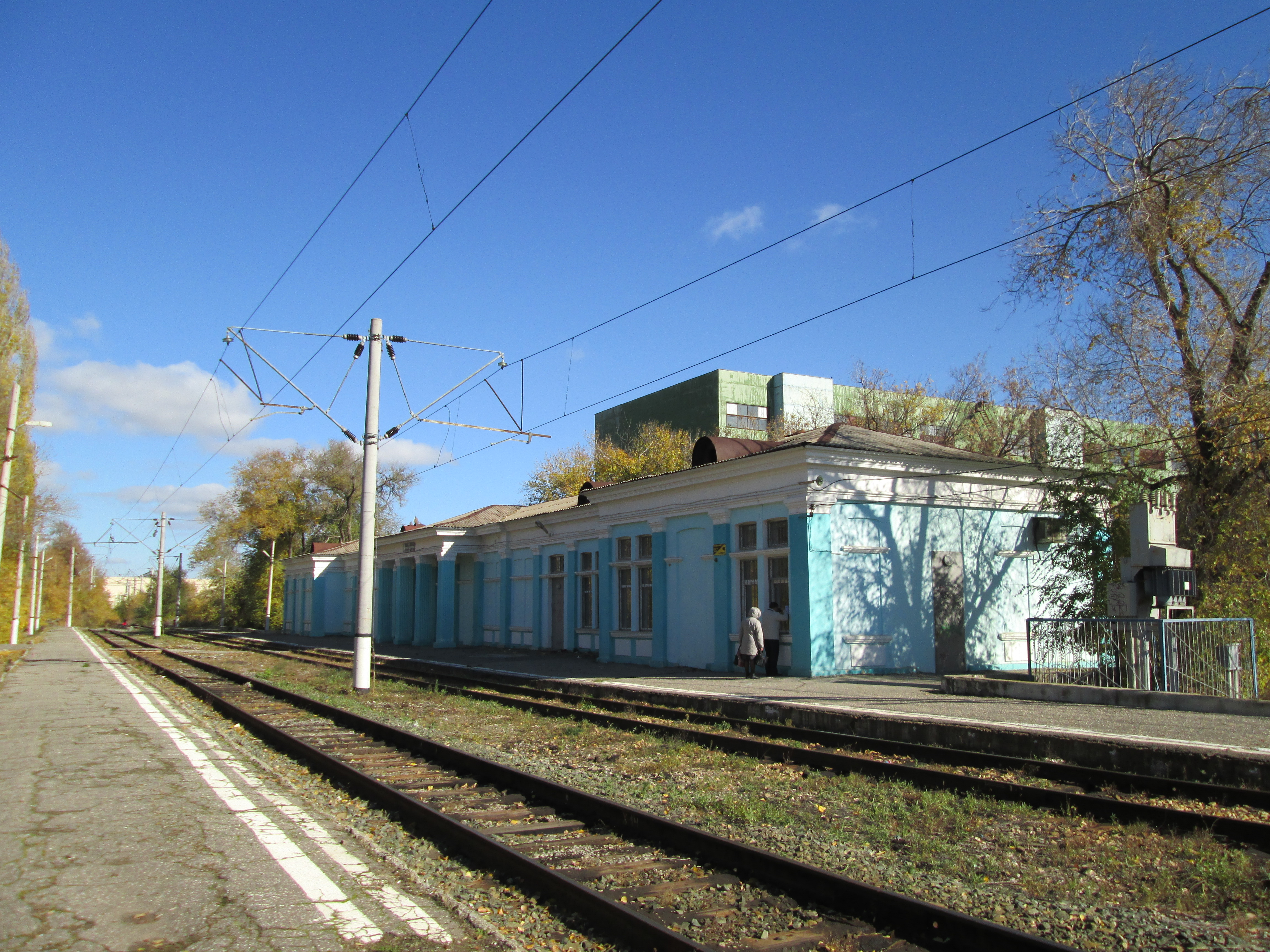 Тракторная-Пассажирская